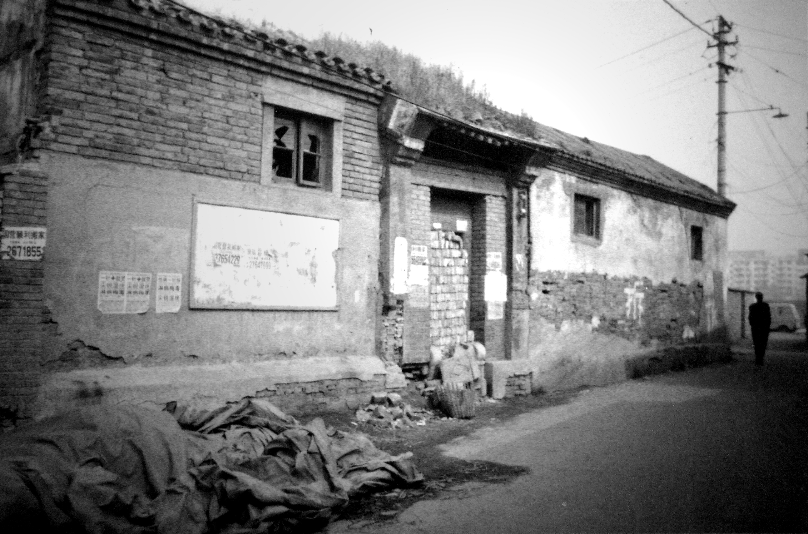 拆遷之前的李叔同故居